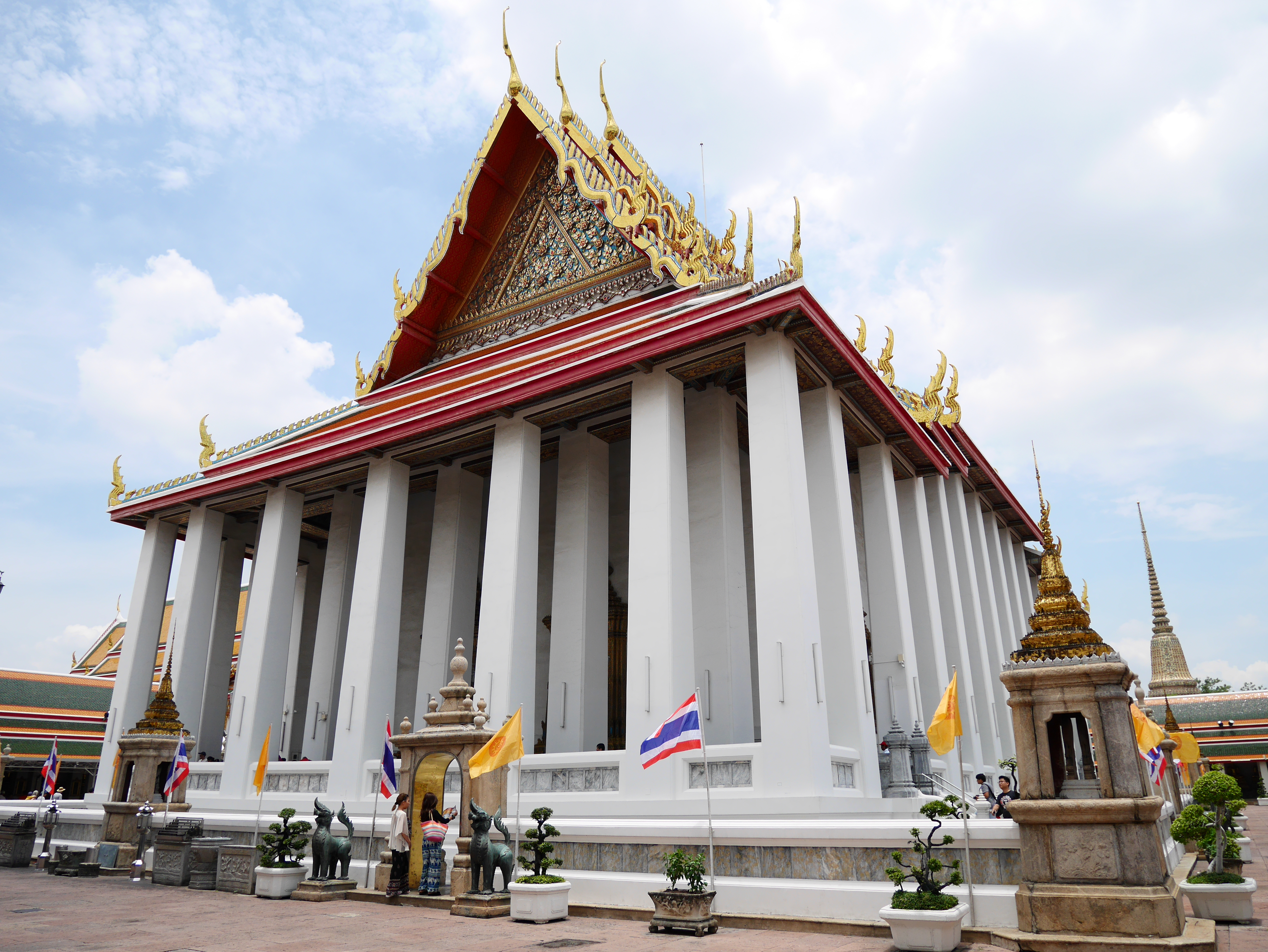 วัดพระเชตุพนวิมลมังคลาราม